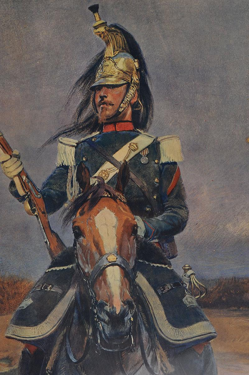 ÉDOUARD DETAILLE - DRAGON DE LA GARDE IMPÉRIALE, SECOND EMPIRE - 1906